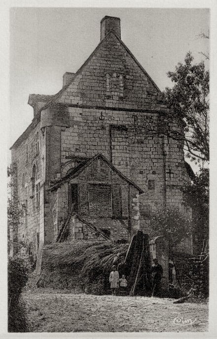 Château de Bossay, ancienne forteresse dont seul subsiste le donjon (XIIe) remanié ensuite aux XIV-XVIe (échauguette, tour d'escalier...)